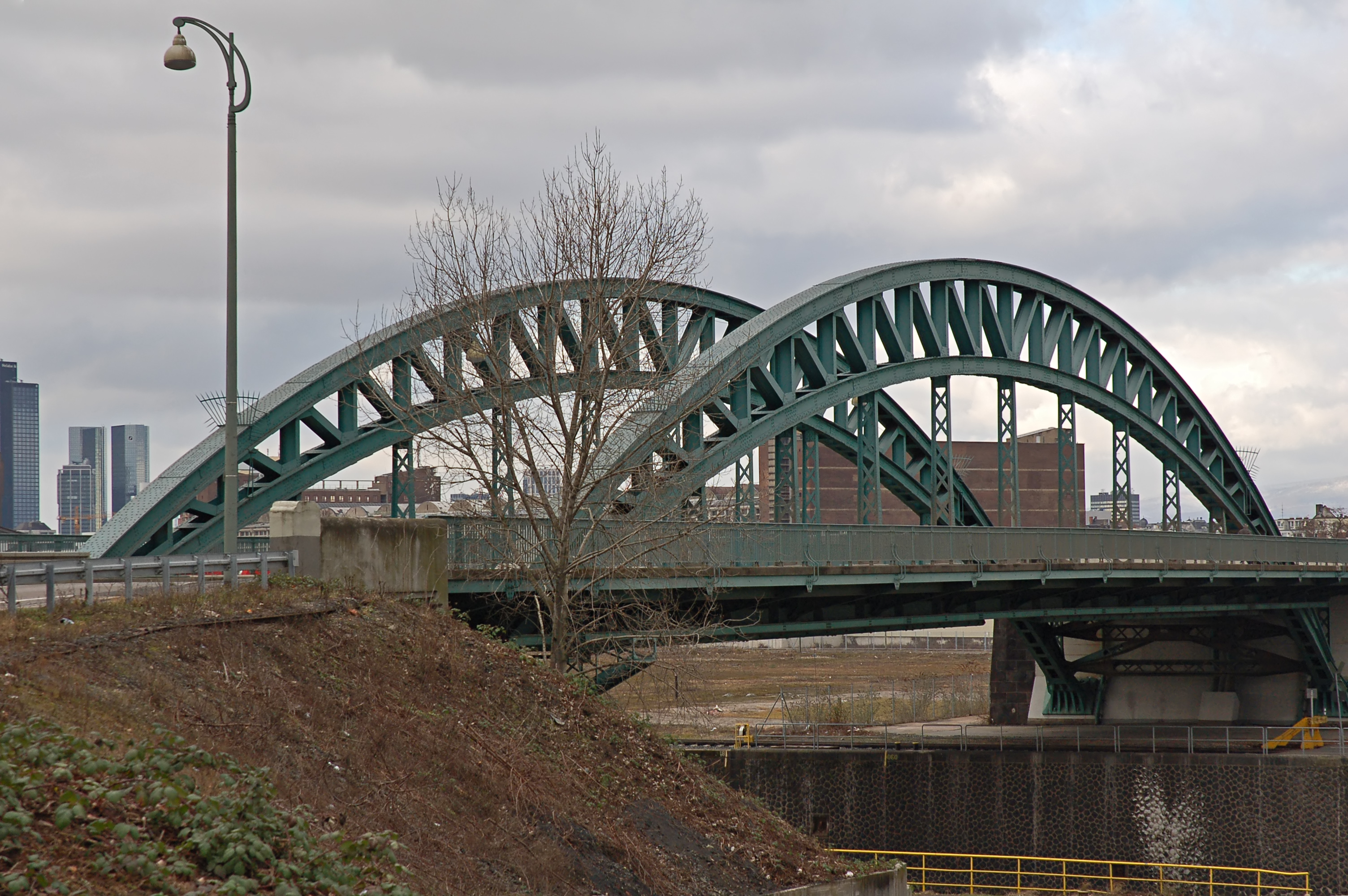 Honsellbrücke am Osthafen Frankfurt